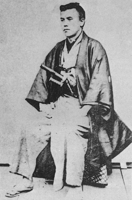 Portrait of Kido Takayoshi (木戸孝允, 1833 – 1877)